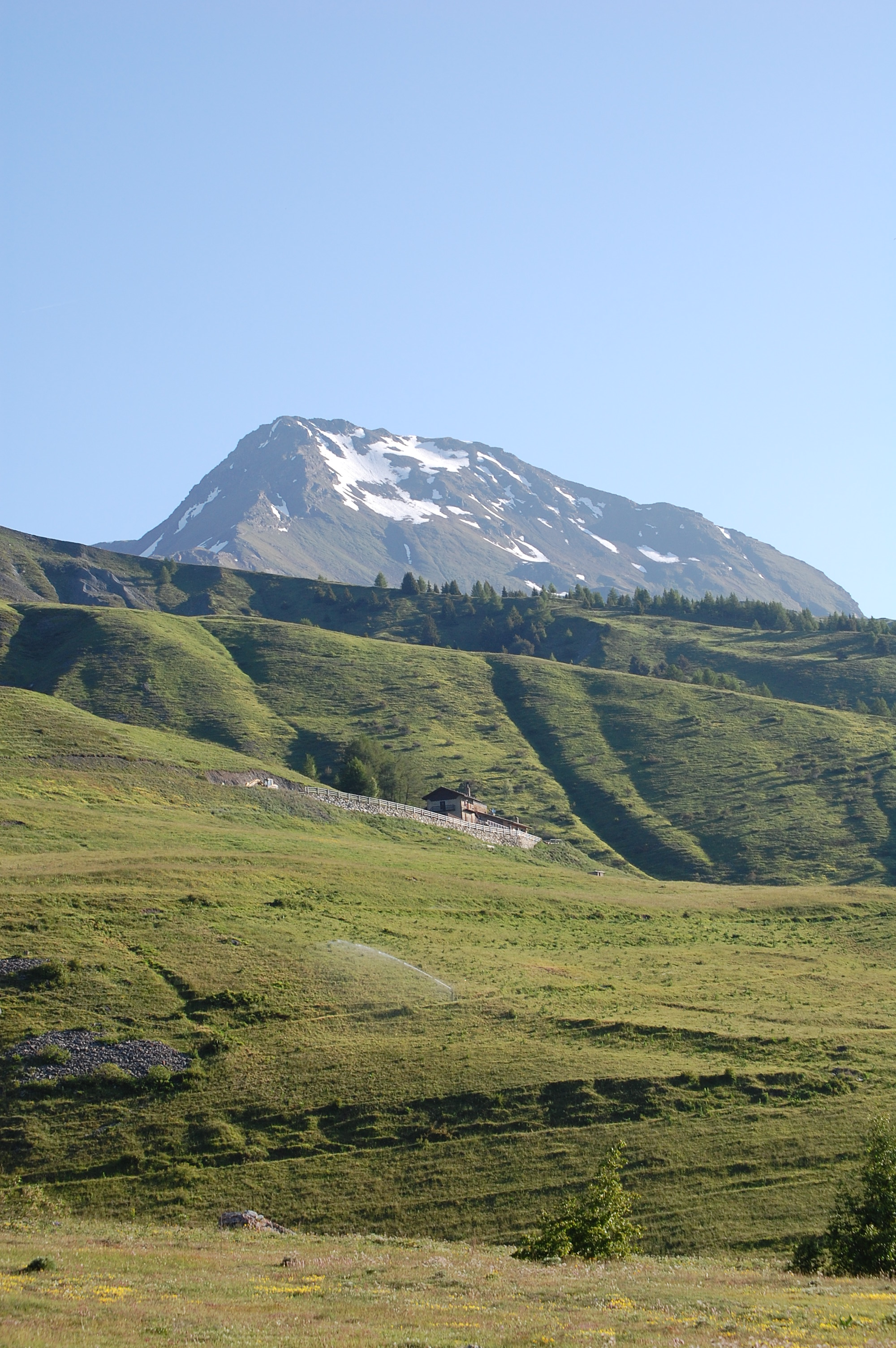 Mont Fallère (vu depuis Vetan)